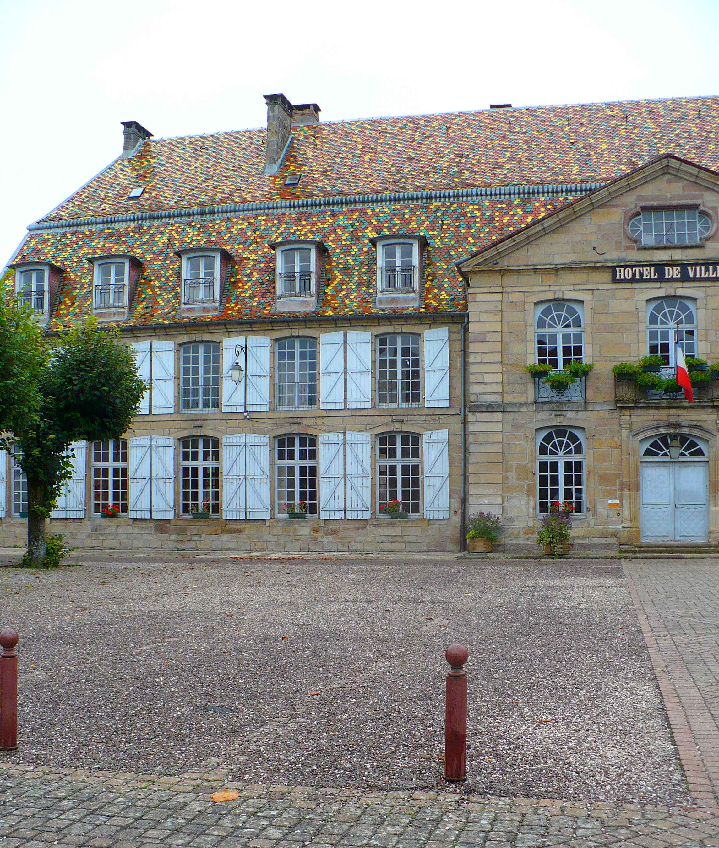 Chateau de Clermont-Tonnerre à Vauvillers